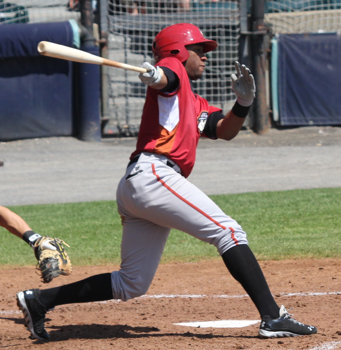 4/24/13 Mel Rojas at bat.